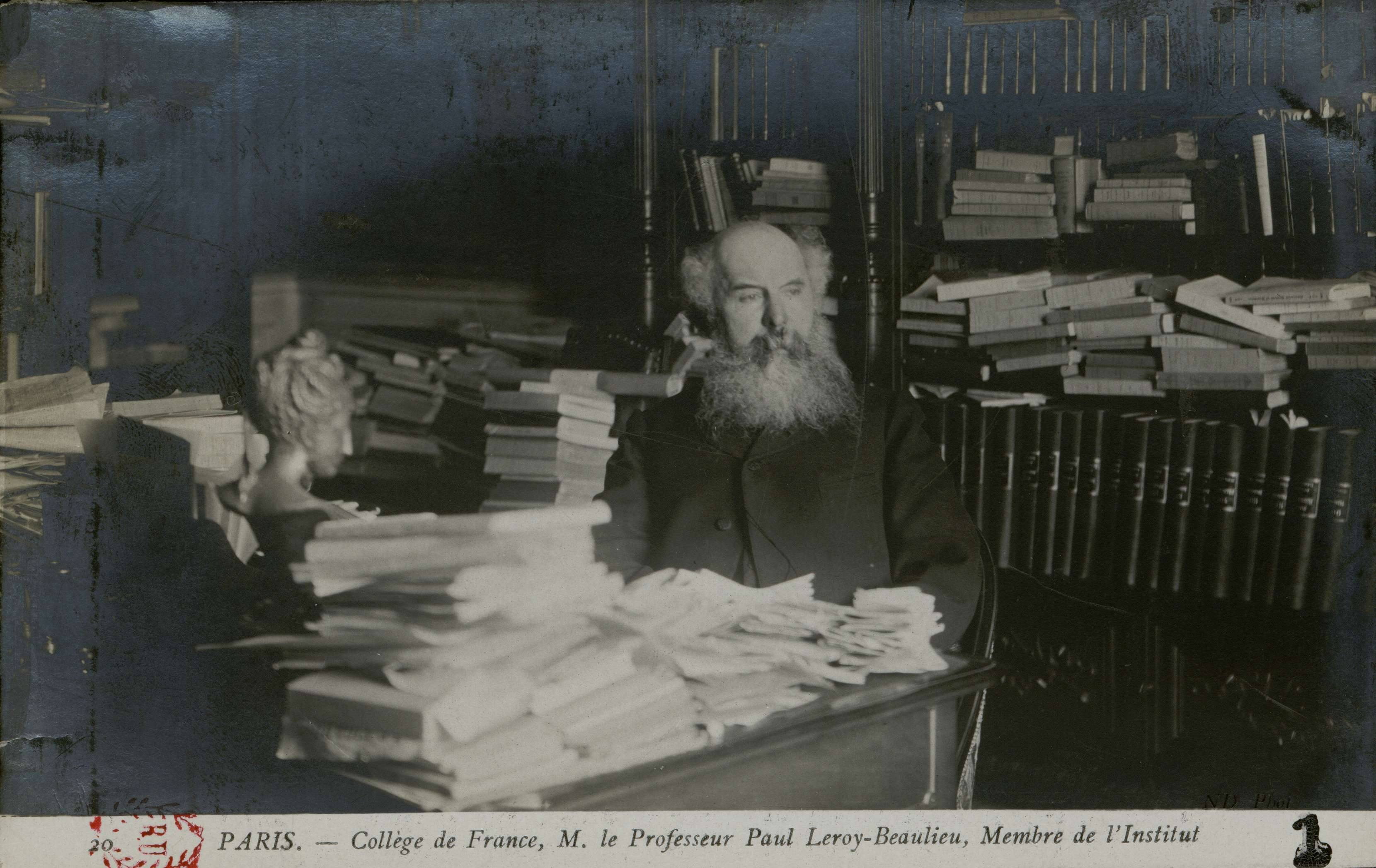 Carte postale photographique